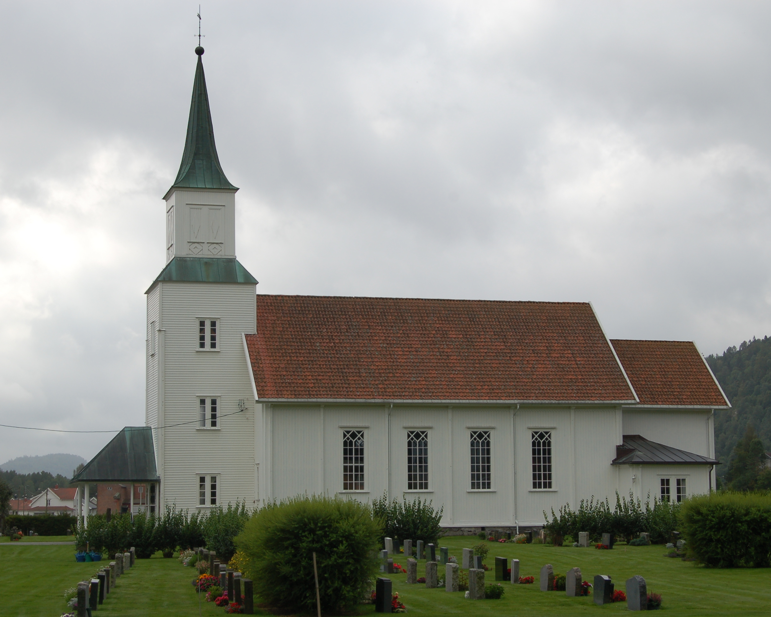 Kvelde kirke